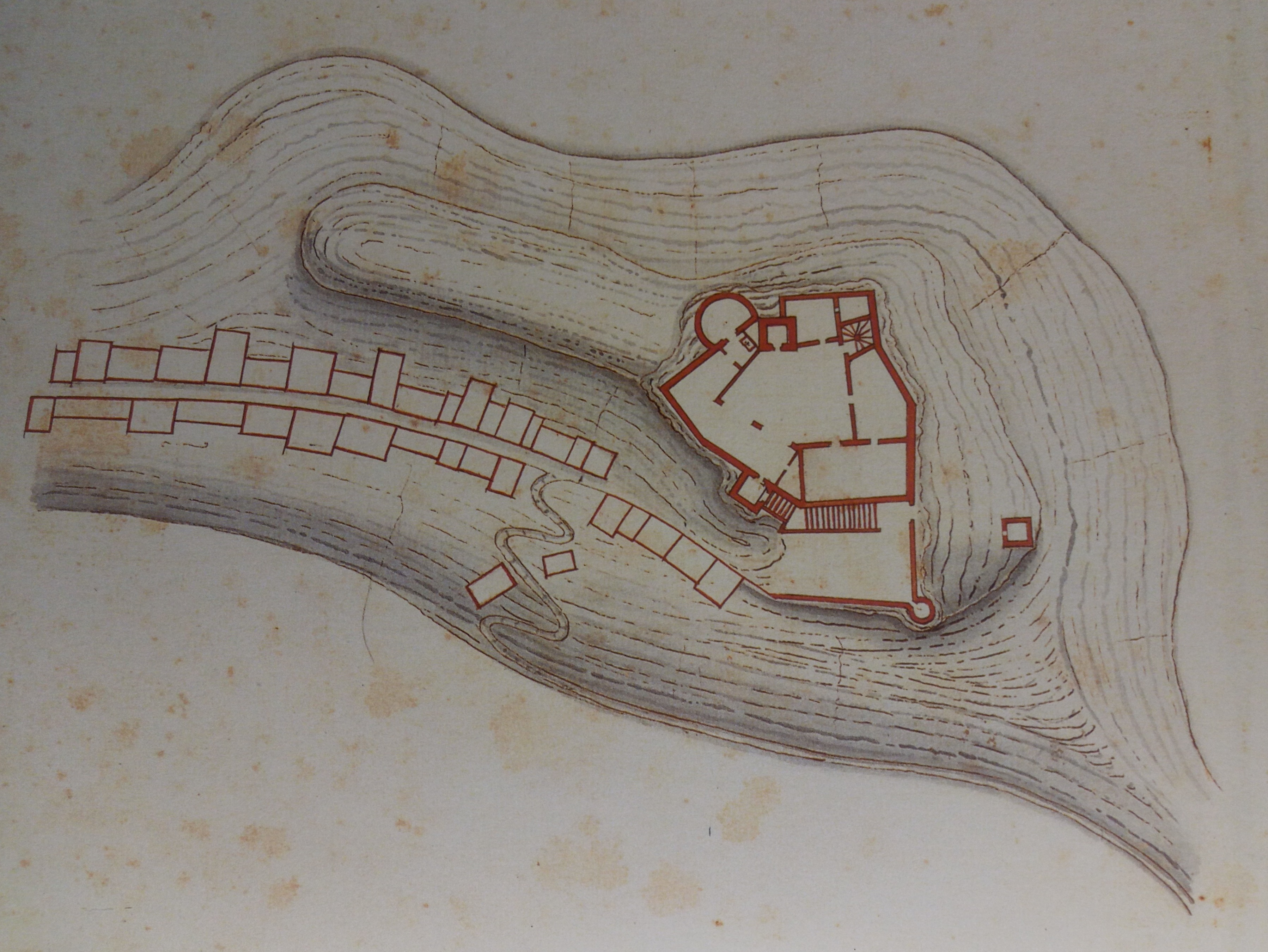 Plan de Beuil et de son château vers 1650 d'après Carlo Morello in "Avertimento sopra le fortezze di SAR"